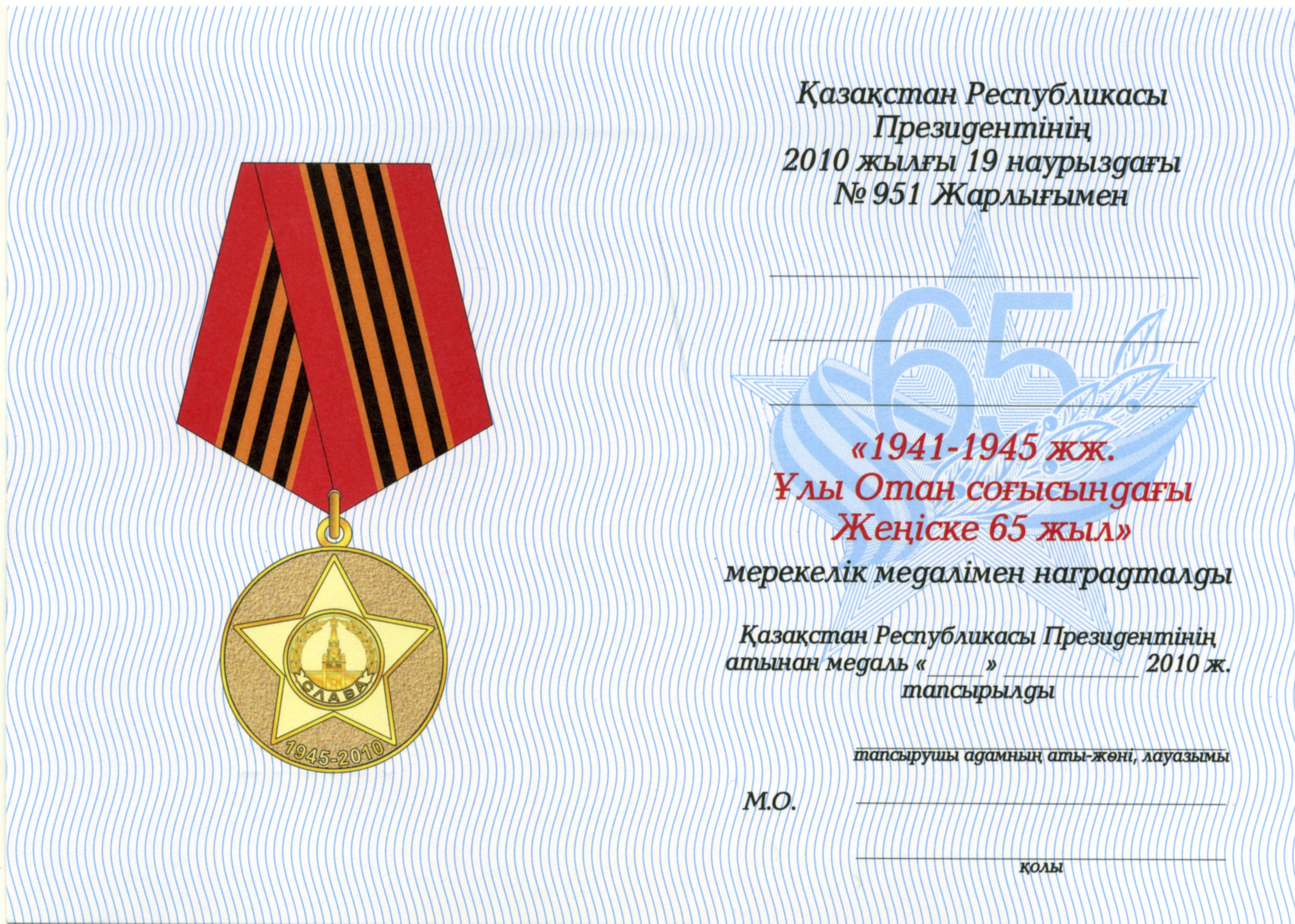 Удостоверение к медали Республики Казахстан «65 лет Победы в Великой Отечественной войне»